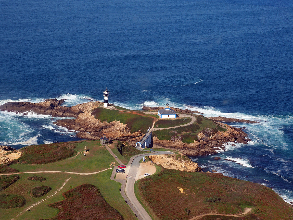 Vista aérea del Faro de la isla Pancha, Ribadeo, Lugo